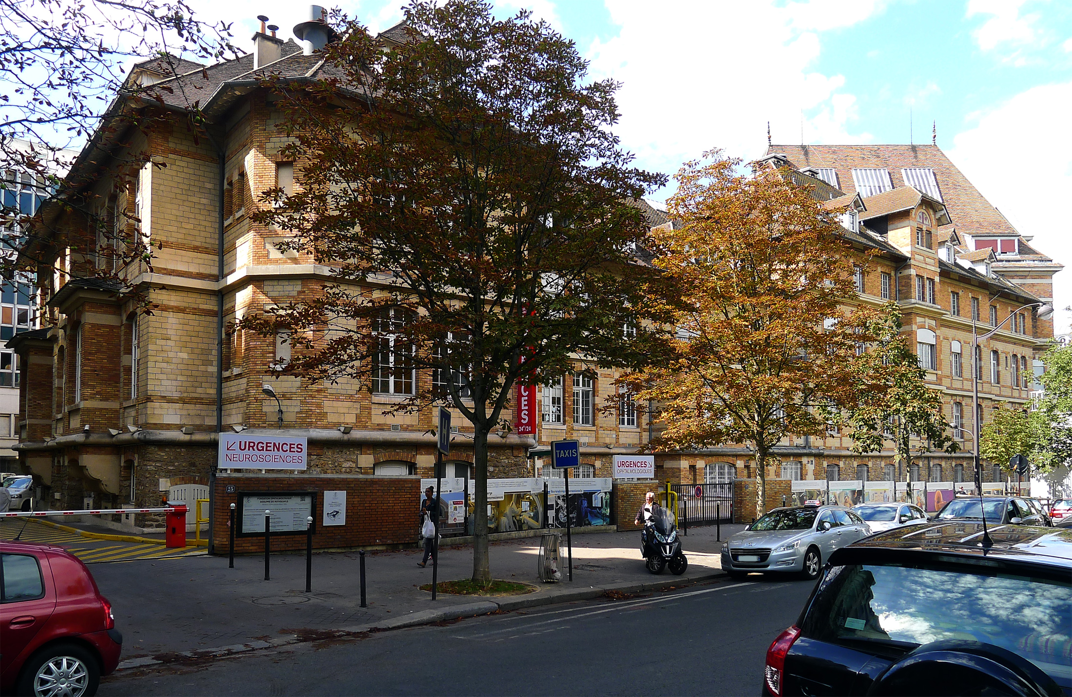 Rue Manin (n°27 et 29, fondation ophtalmologique Adolphe de Rotschild) - Paris XIX